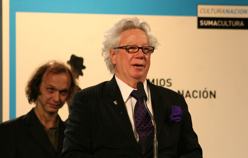 Rogelio Polesello